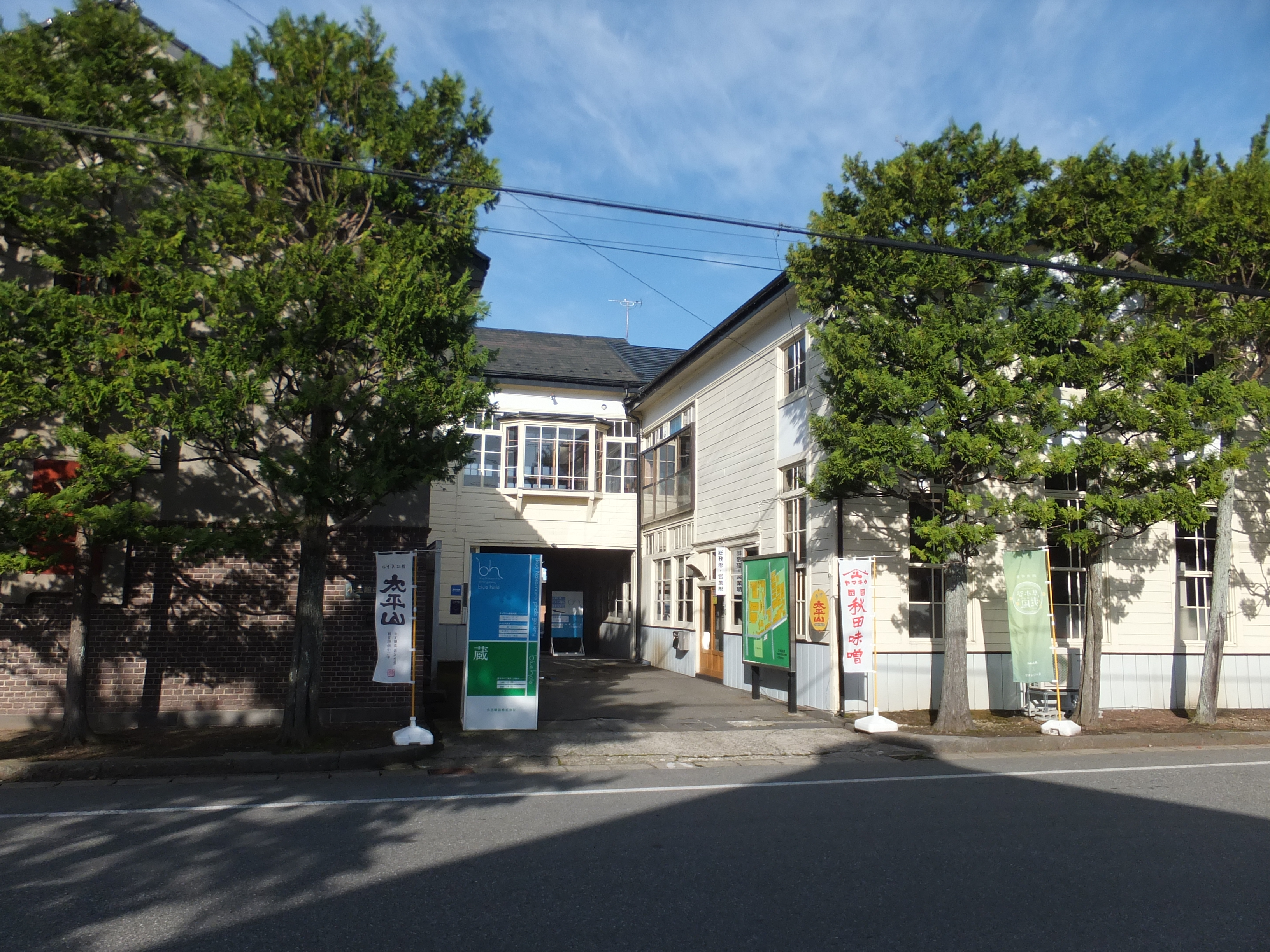 小玉醸造（秋田県潟上市）